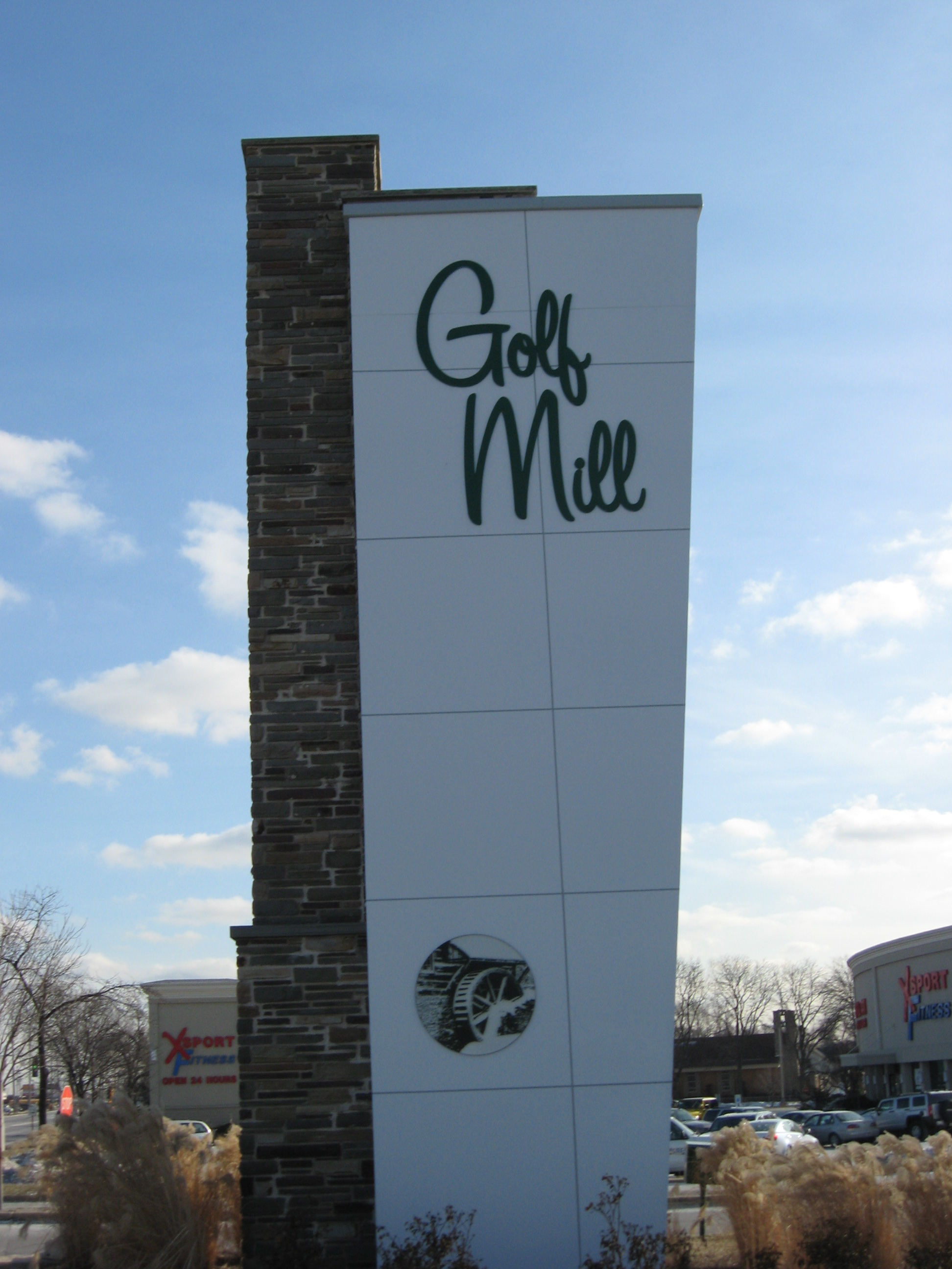 Golf Mill Mall